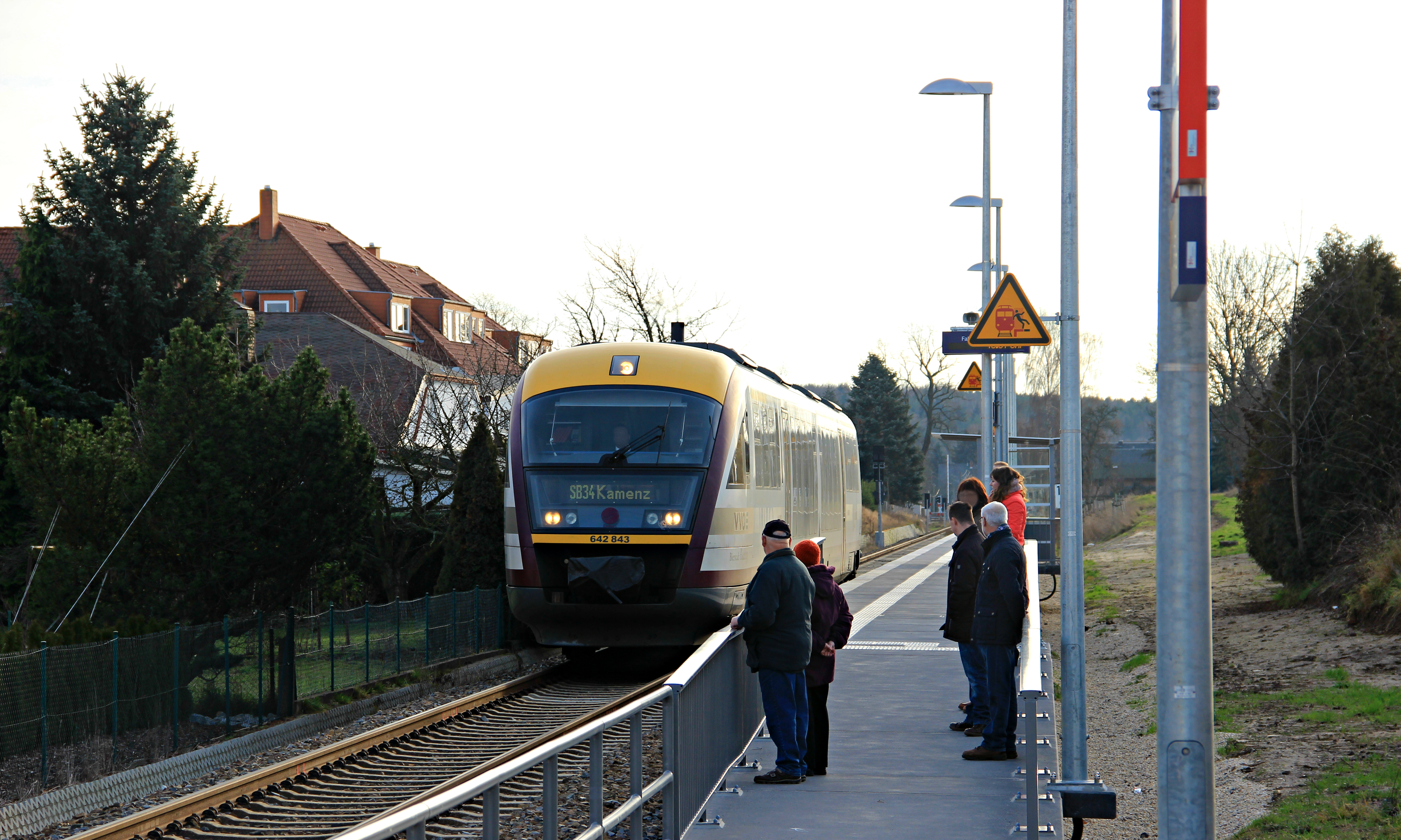 Triebwagen der Städtebahn Sachsen fährt in den neuen Haltepunkt Pulsnitz Süd ein.